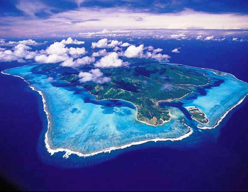 DSC061/Polynésia/Huahiné Island/